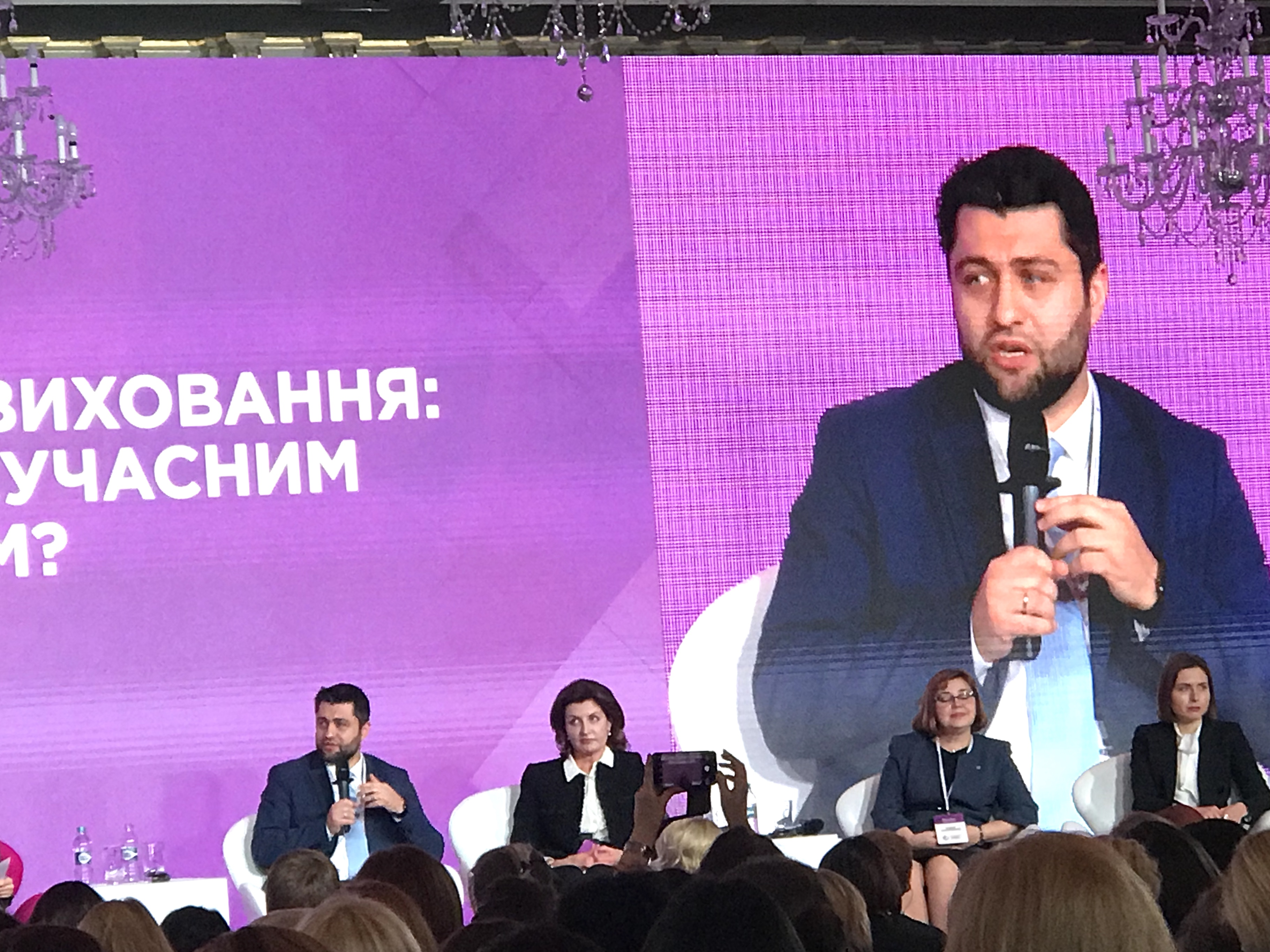 Міжнародний жіночий форум